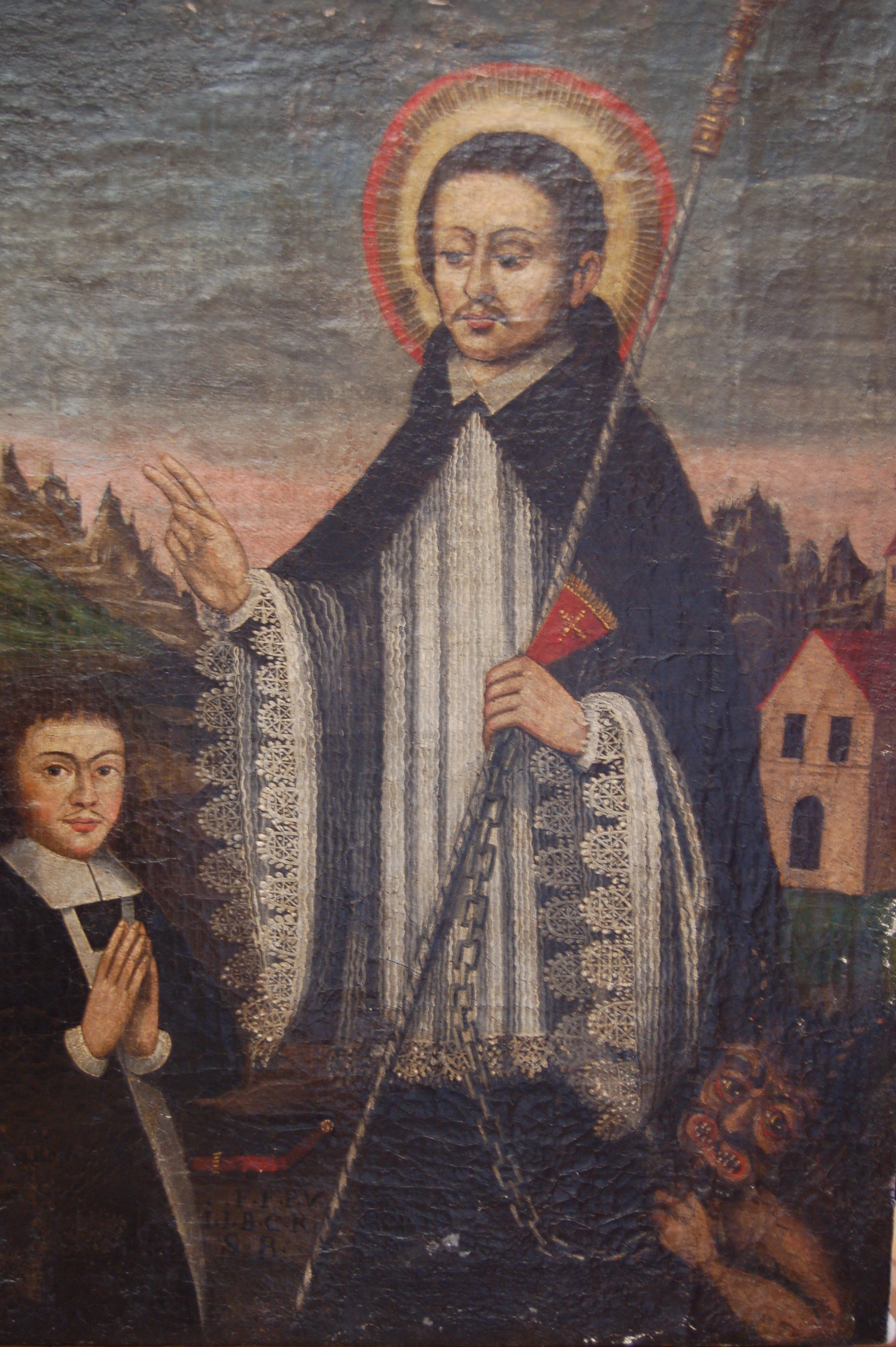 Saint Bernard de Mont-Joux, à droite, bénit le novice Roland Viot, agenouillé devant lui, huile sur toile, 1607